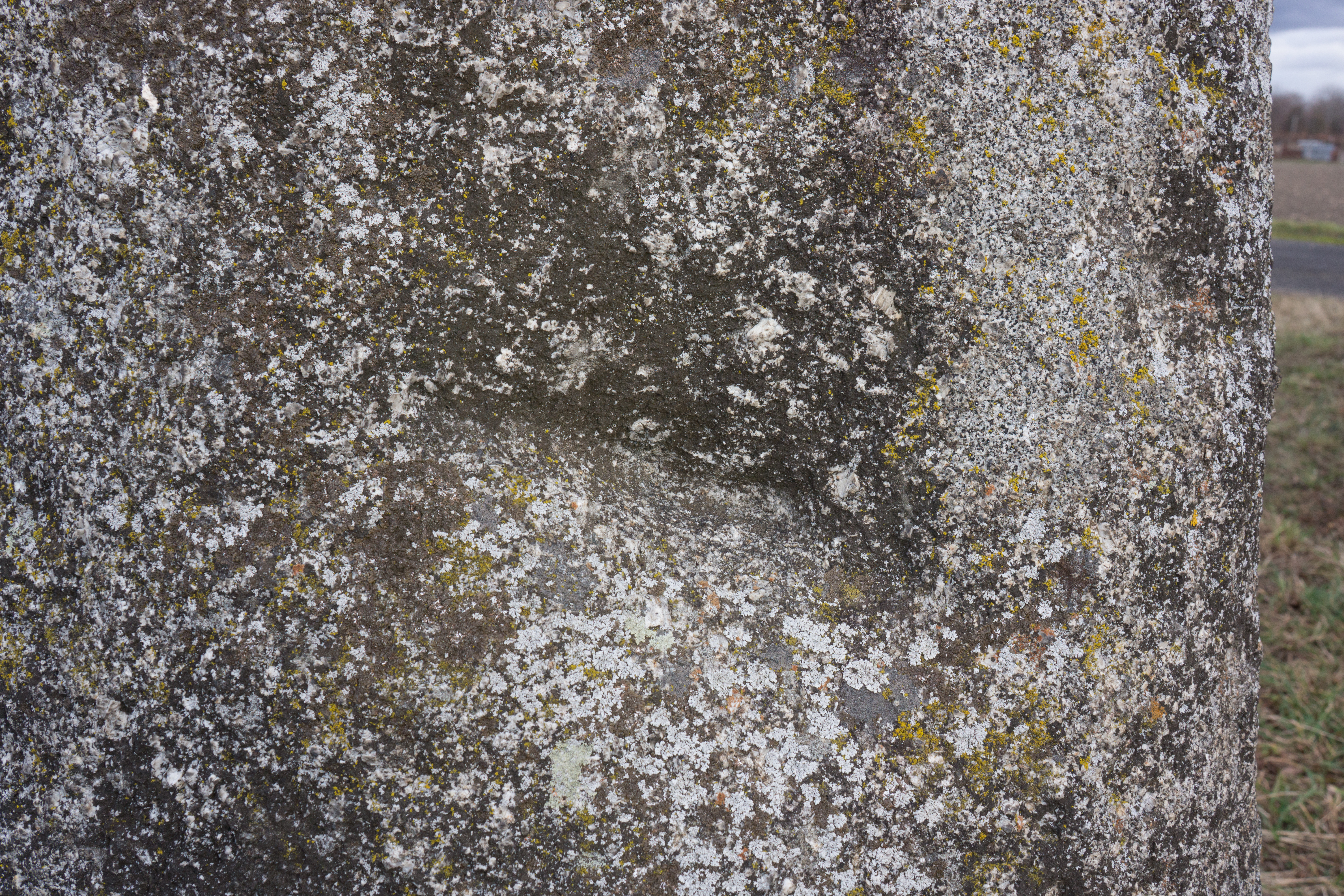 Menhir de la Grande Borne - Dépression